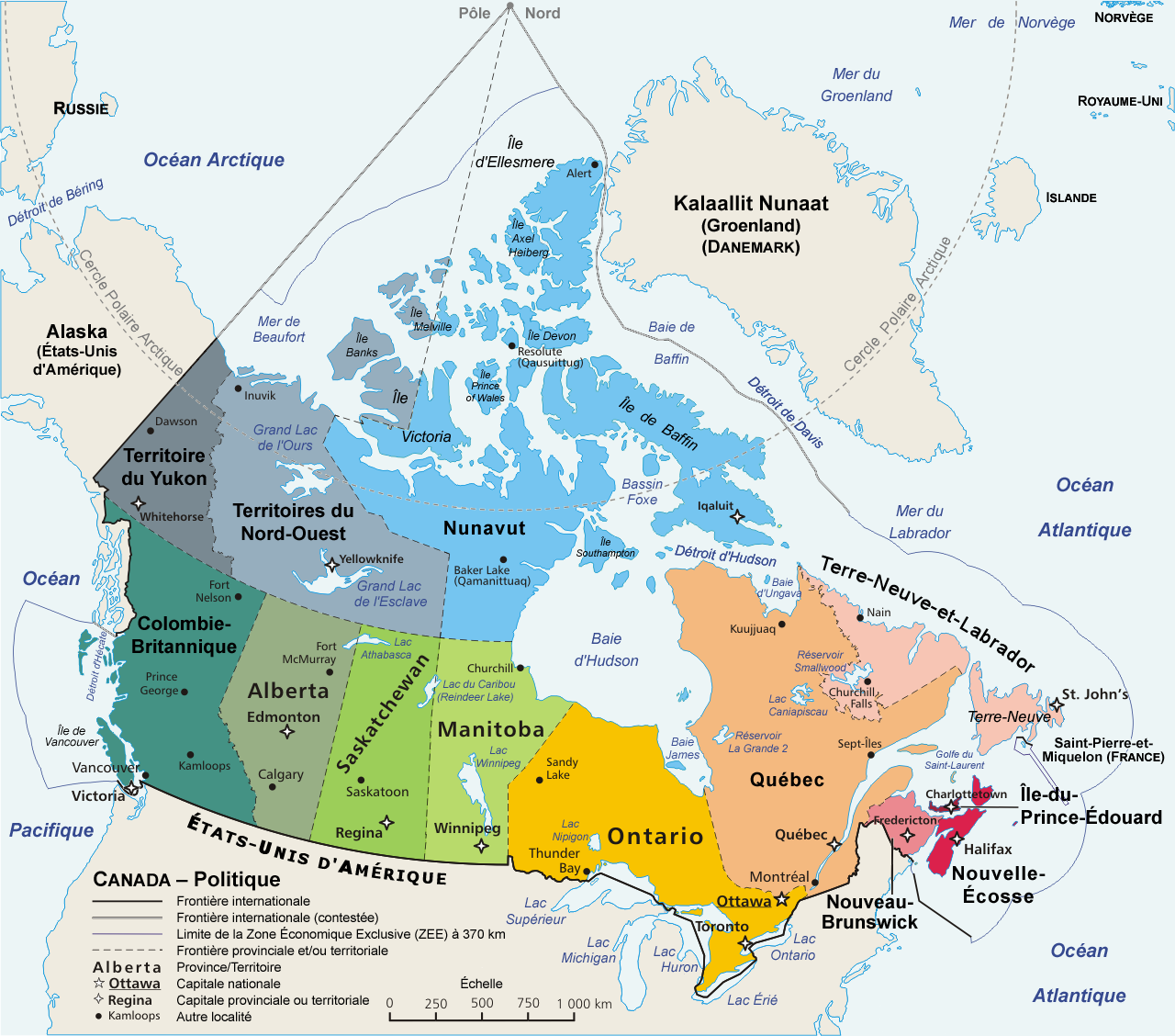 Carte politique du Canada en français